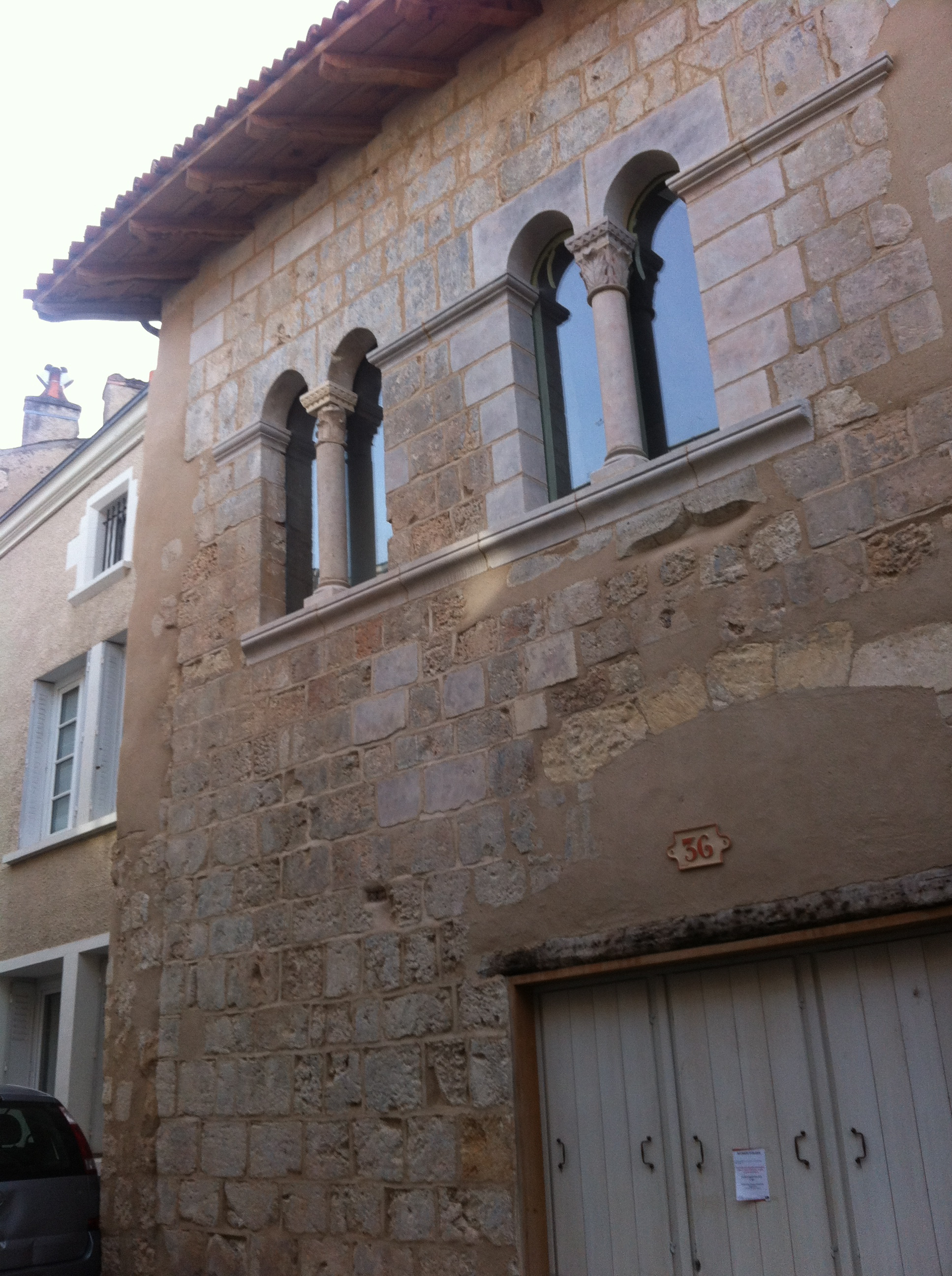 Maison romane (Inscrit) .